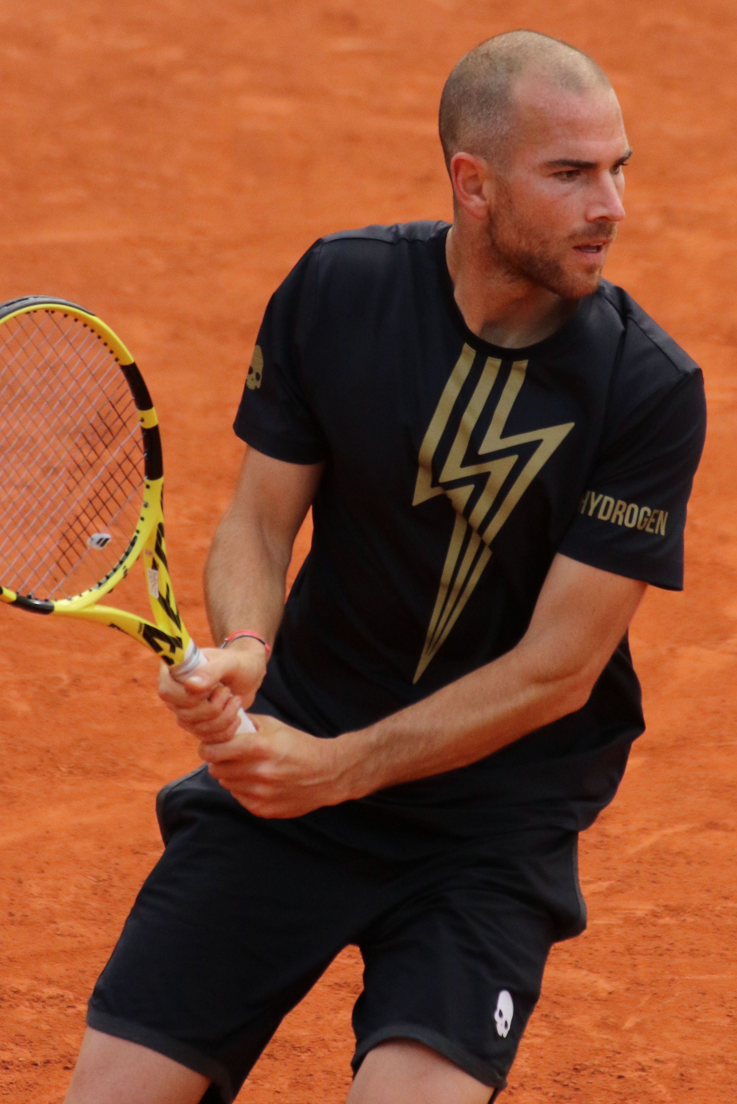 Mannarino RG19 (19)